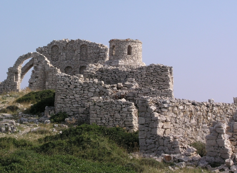 Mana, Kornati, Croatia